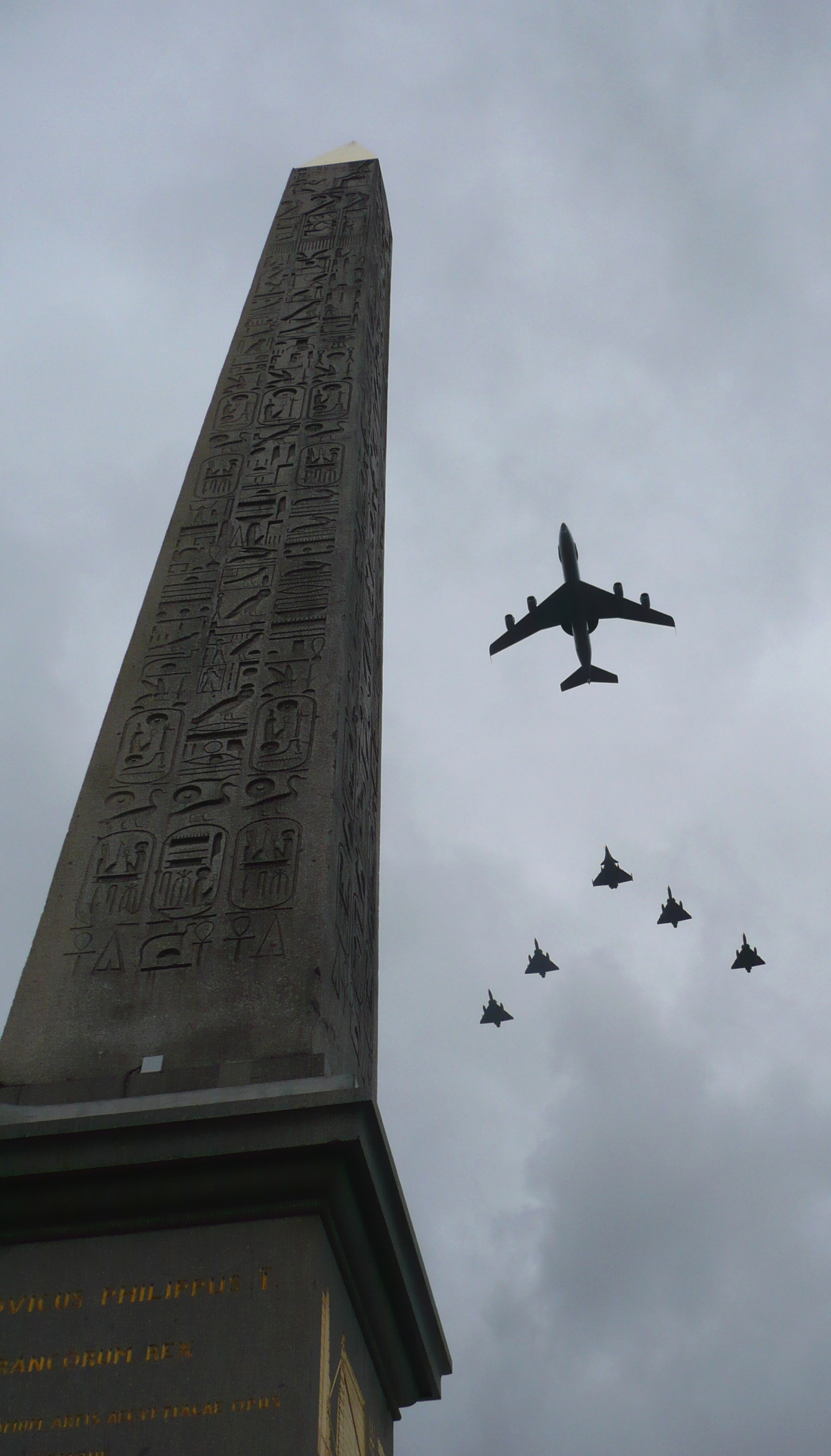 Avions militaires en formation. Place de la Concorde, Paris (France).